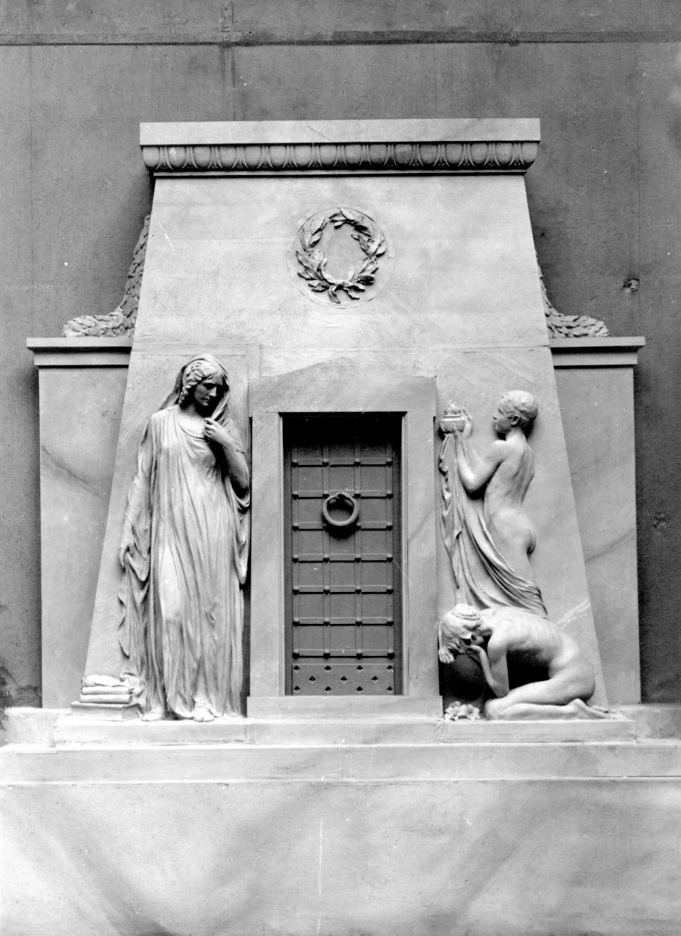 Martin Schauß: Grabdenkmal. Große Berliner Kunstausstellung 1907.